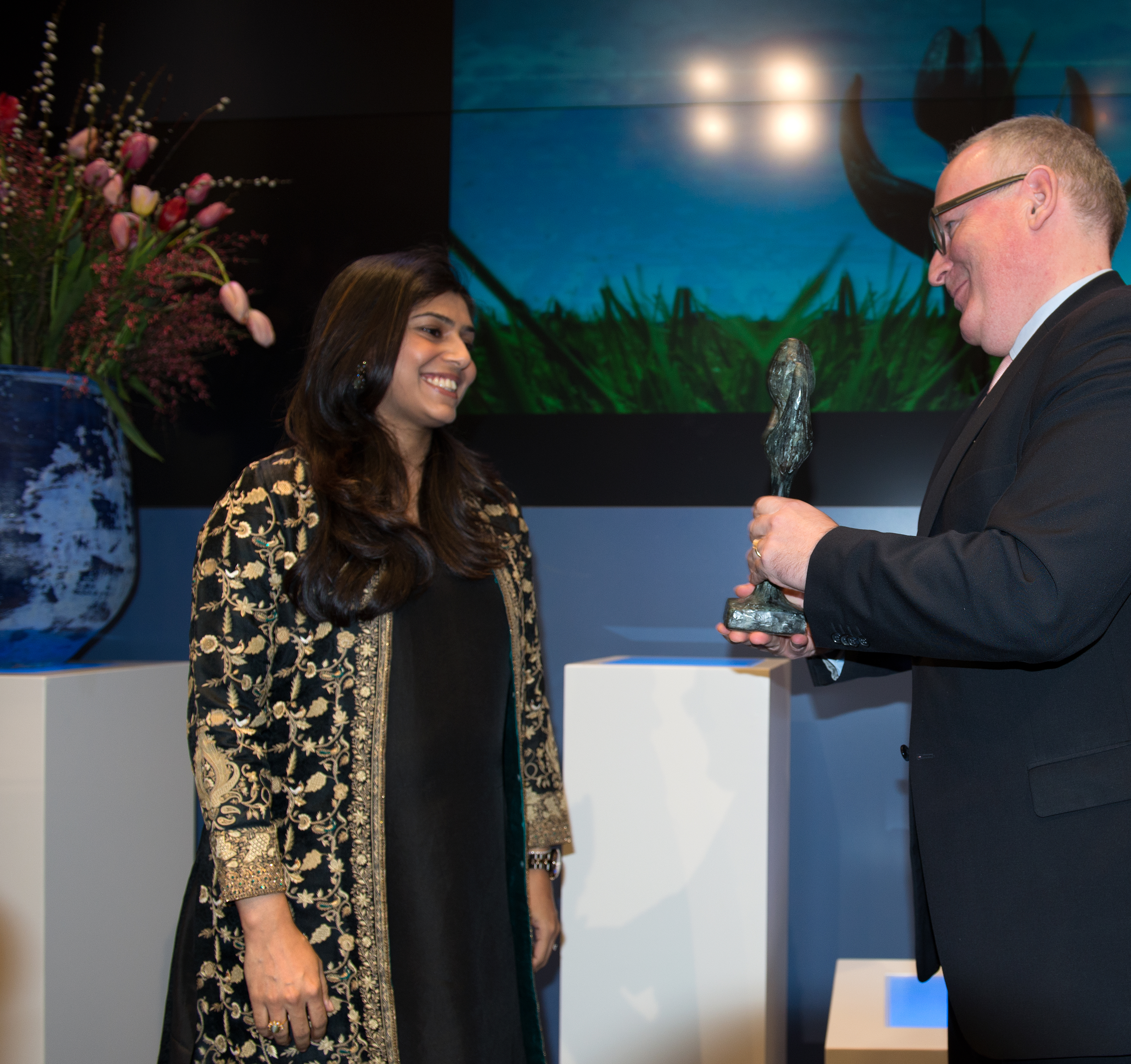 2013 12 11 Mensenrechtentulp Aahung Sheena Hadi 0687